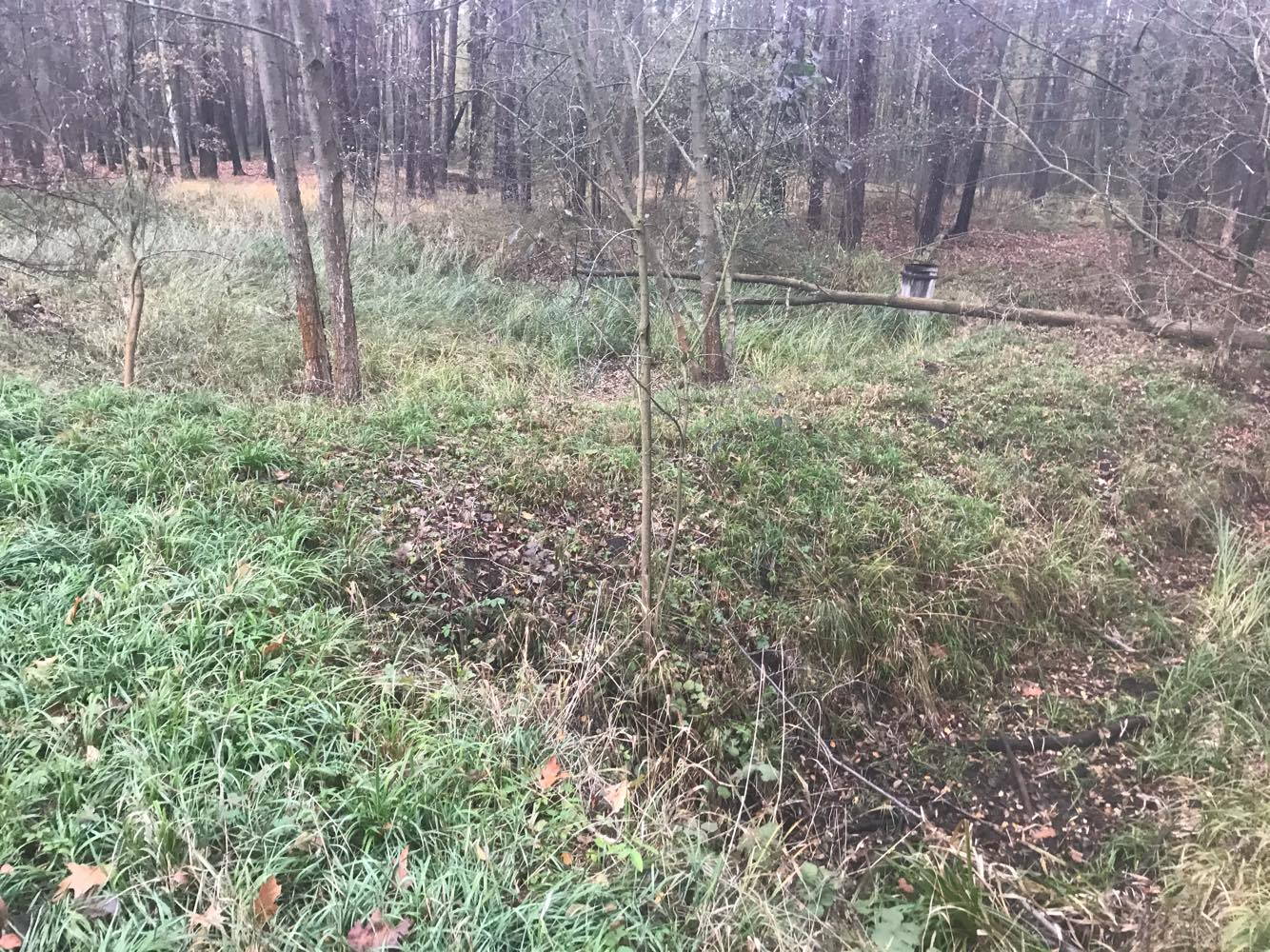 Nejmenší z rybníčků, propojený s největším rybníčkem